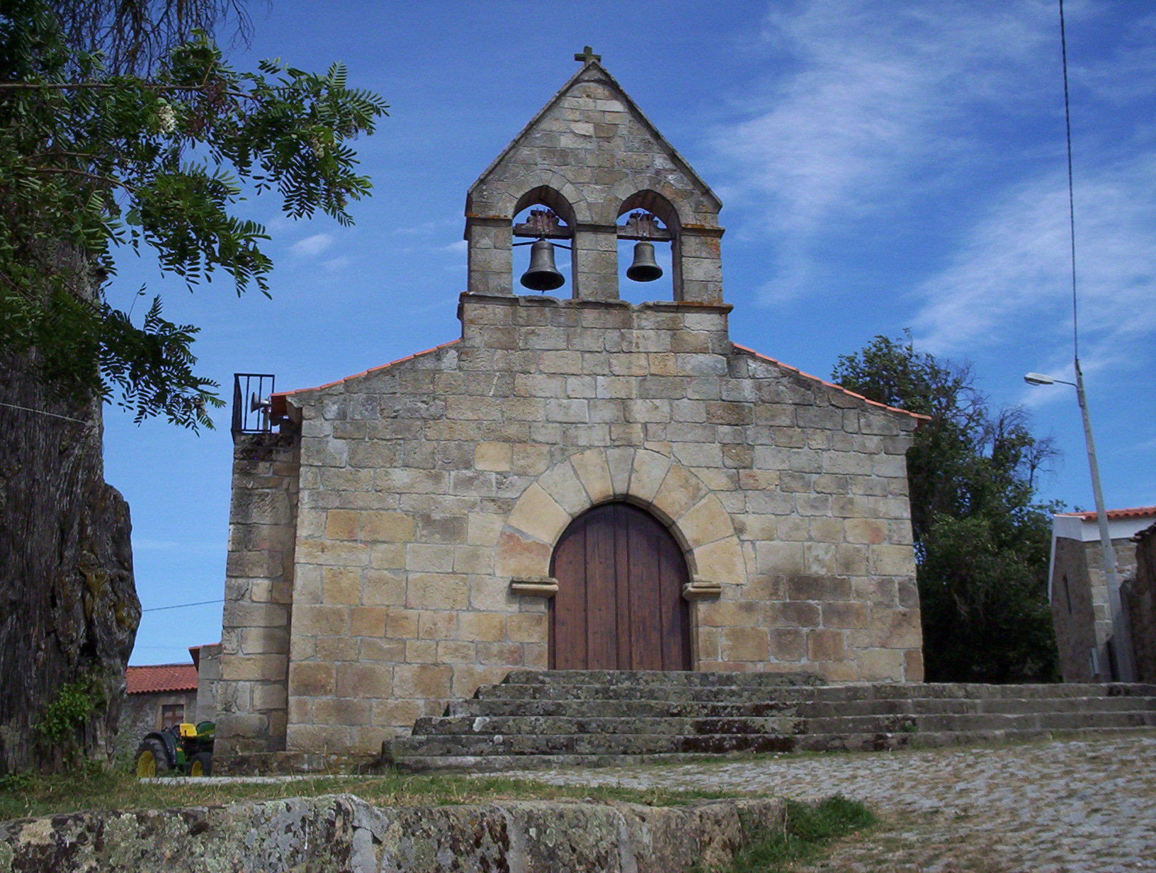 Igreja Paroquial do Bogalhal, Pinhel